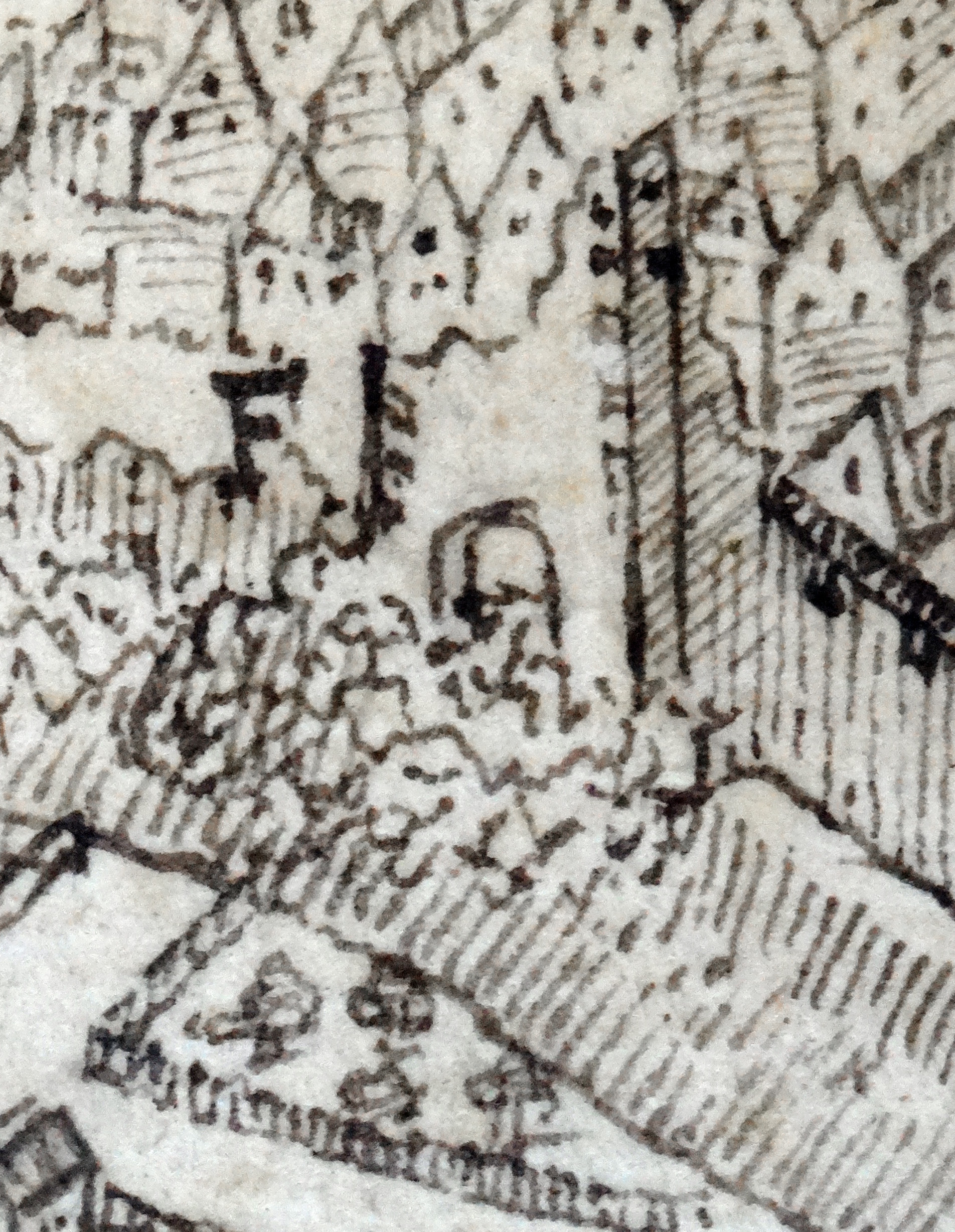 Martinspforte, Worms, nach der Zerstörung 1689. Detail aus: Peter Hamman: Ansicht der Stadt Worms nach der Zerstörung 1689 von Norden. Stadtarchiv Worms, Abt. 1B, Nr. 48.